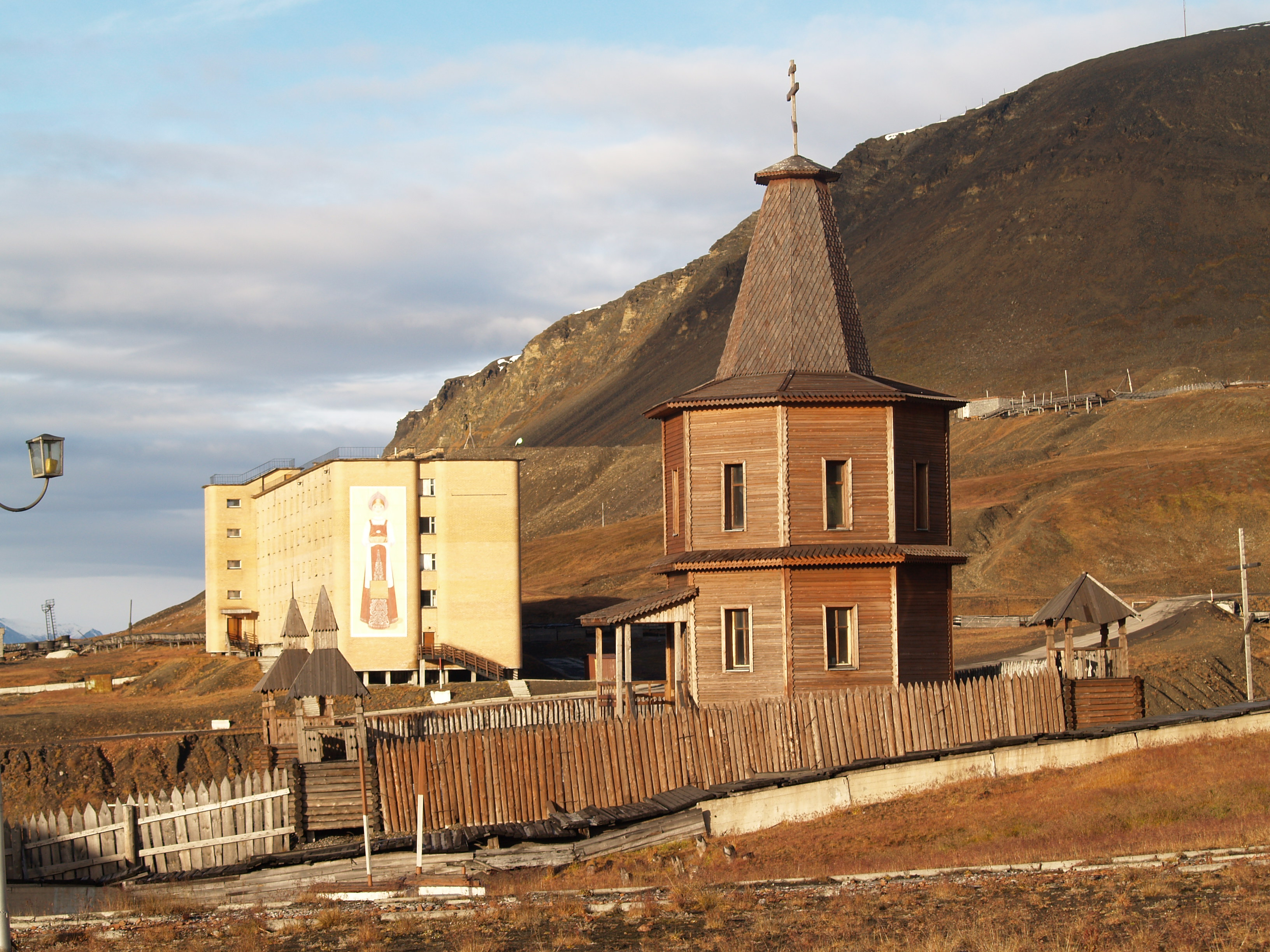 Kapellet i Barentsburg